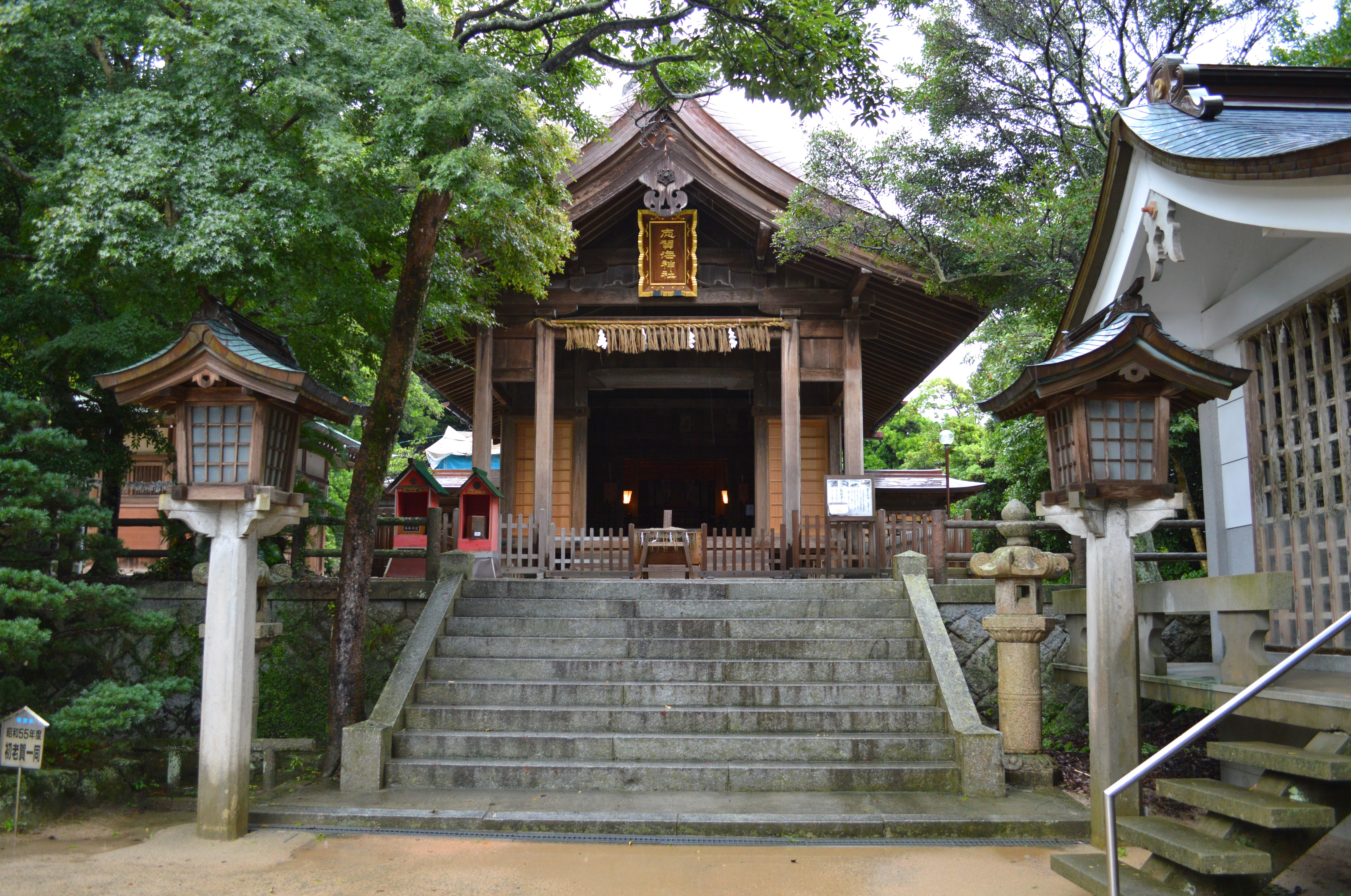 志賀海神社 拝殿